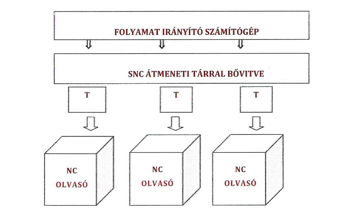 Folyamatirányító számítógép vázlatos rajza